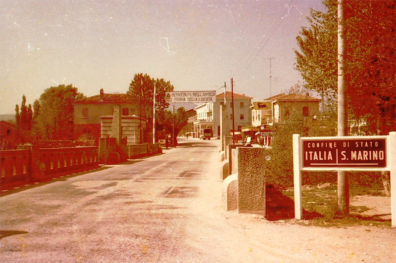 Confine tra Italia e San Marino nel 1957